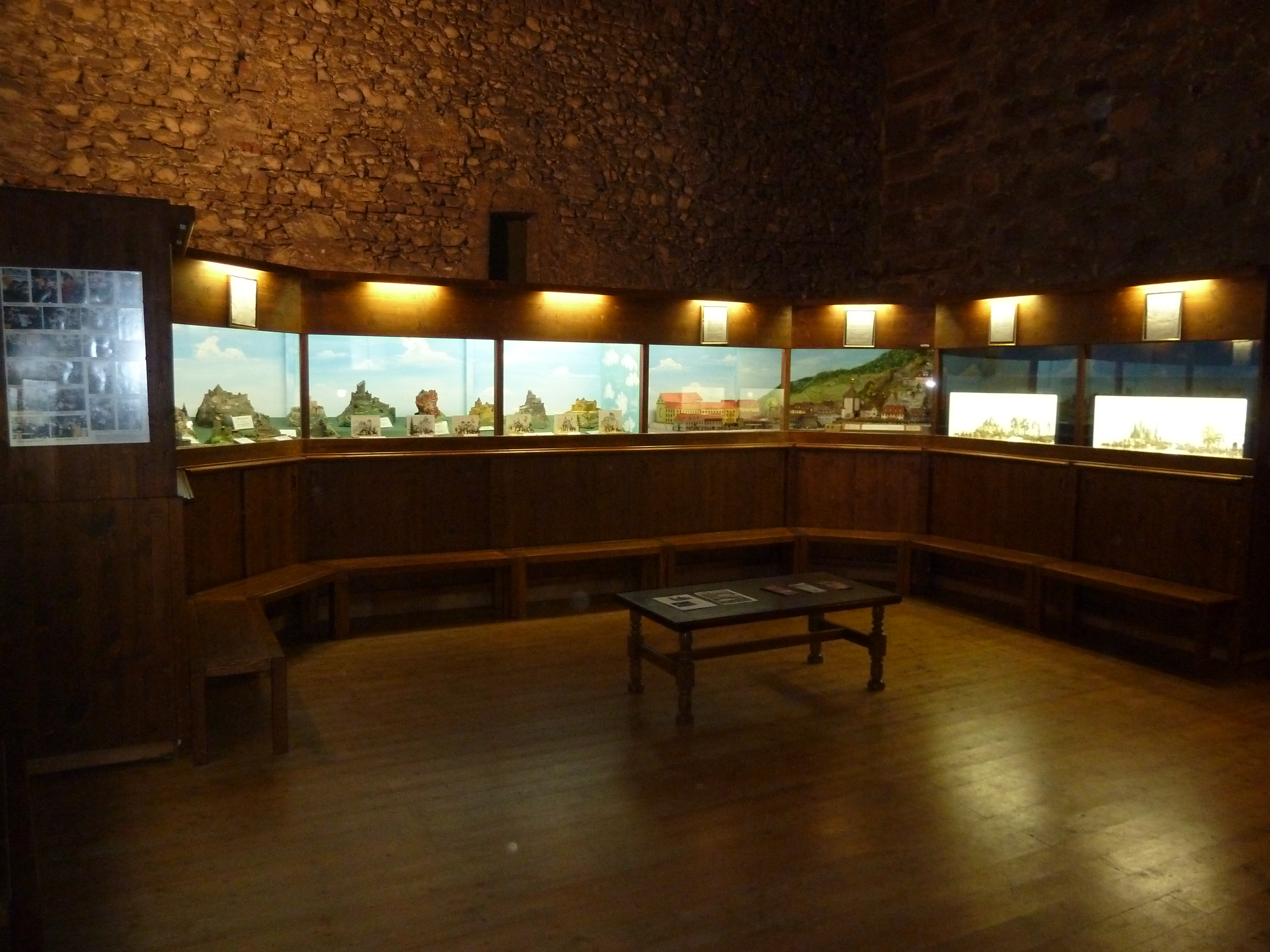 Zinnfigurenklause 2. OG im Freiburger Schwabentor